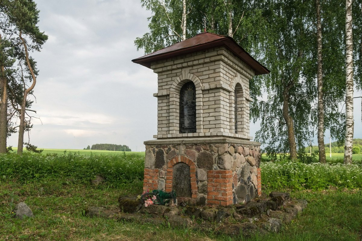 Золькі. Сямейная капліца Гурыновічаў адноўлена ў 2008 г. (на заднім плане, лясок у аддаленні - вайсковыя могілкі ў Мулярах).